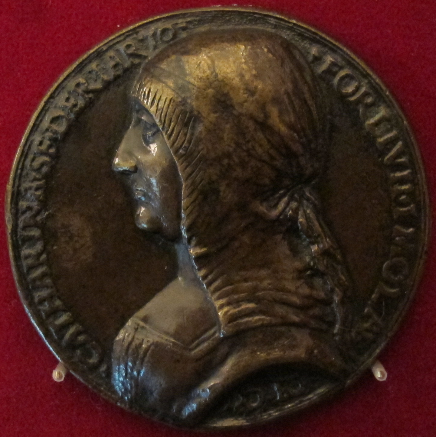 Italia, caterina riario di forlì, riproduzione della medaglia del 1488 ca.